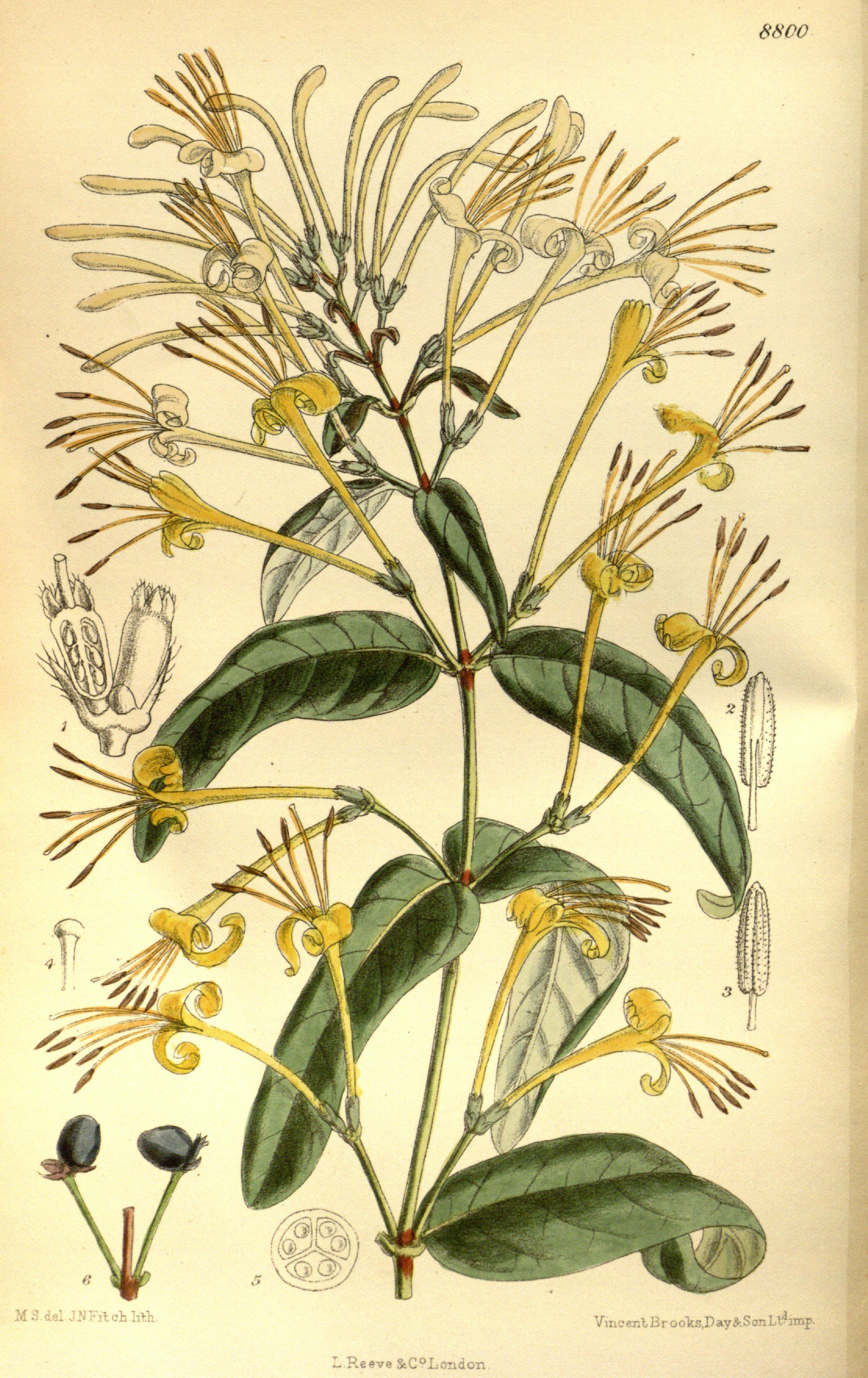 Lonicera similis var. delavayi (= Lonicera macrantha var. similis), Caprifoliaceae